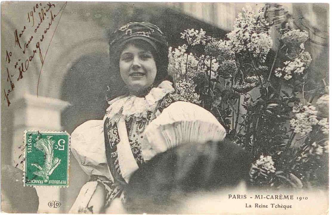 La reine tchèque Ruzena Brazova en costume national défile rue de Rivoli (on en distingue une arcade caractéristique) au Carnaval de Paris, dans le cortège de la Mi-Carême.